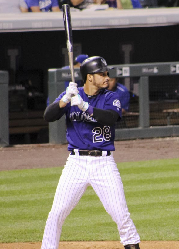 Nolan Arenado